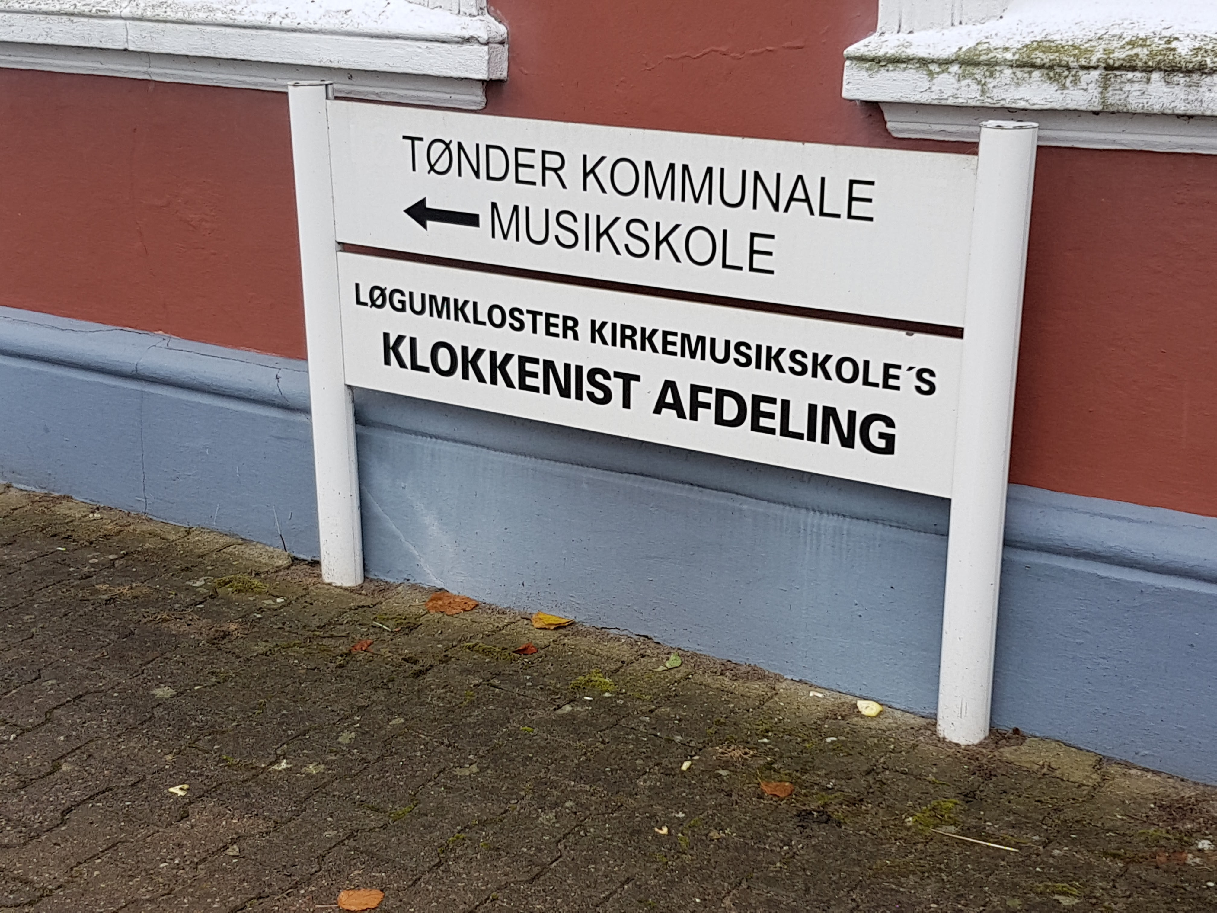 Scandinavian Carillon School